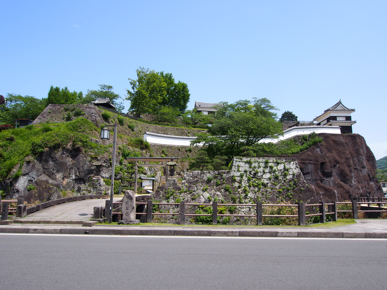 臼杵城（大分県臼杵市）